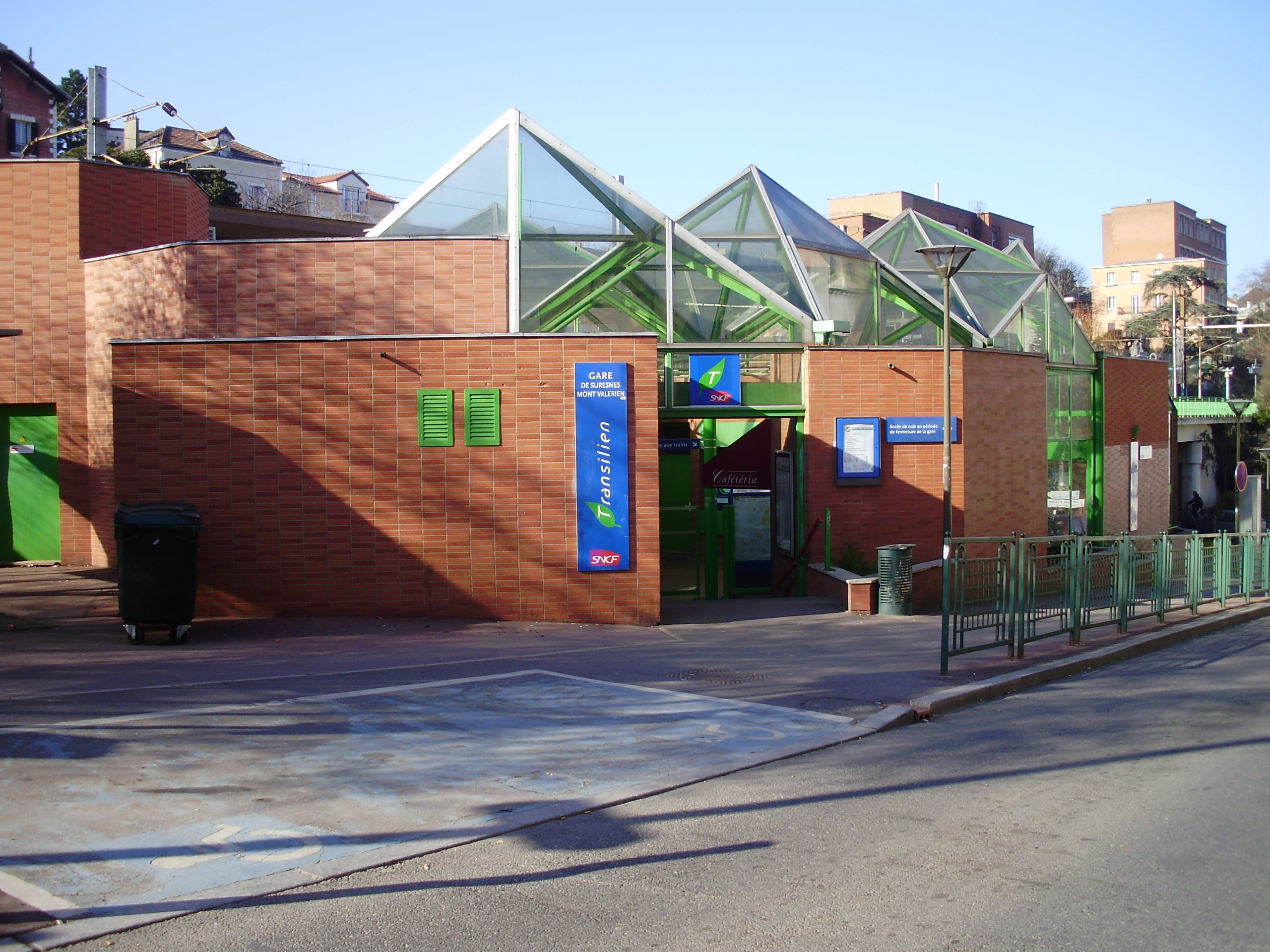 Gare de Suresnes-Mont-Valérien, à Suresnes, Hauts-de-Seine, France (Entrée de la gare en face de l'hôpital Foch)